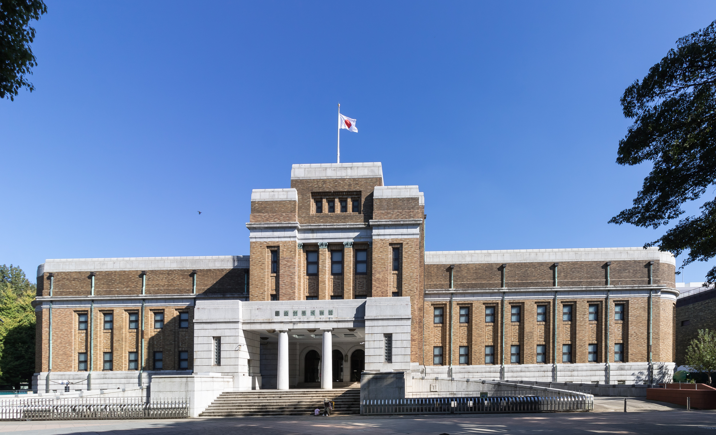 国立科学博物館の日本館の建物。旧東京科学博物館本館。重要文化財。